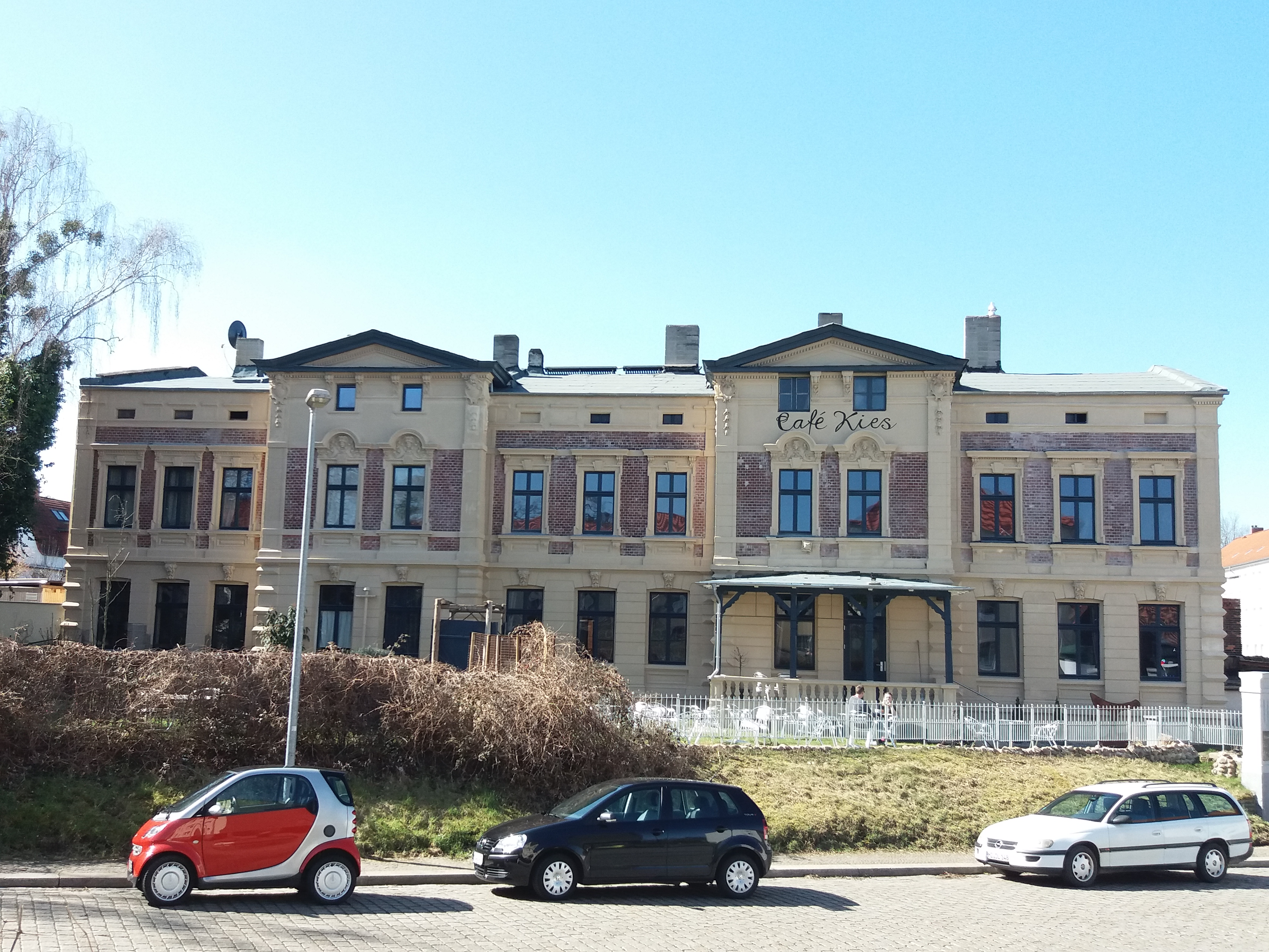 Blick auf das sanierte Café Kies